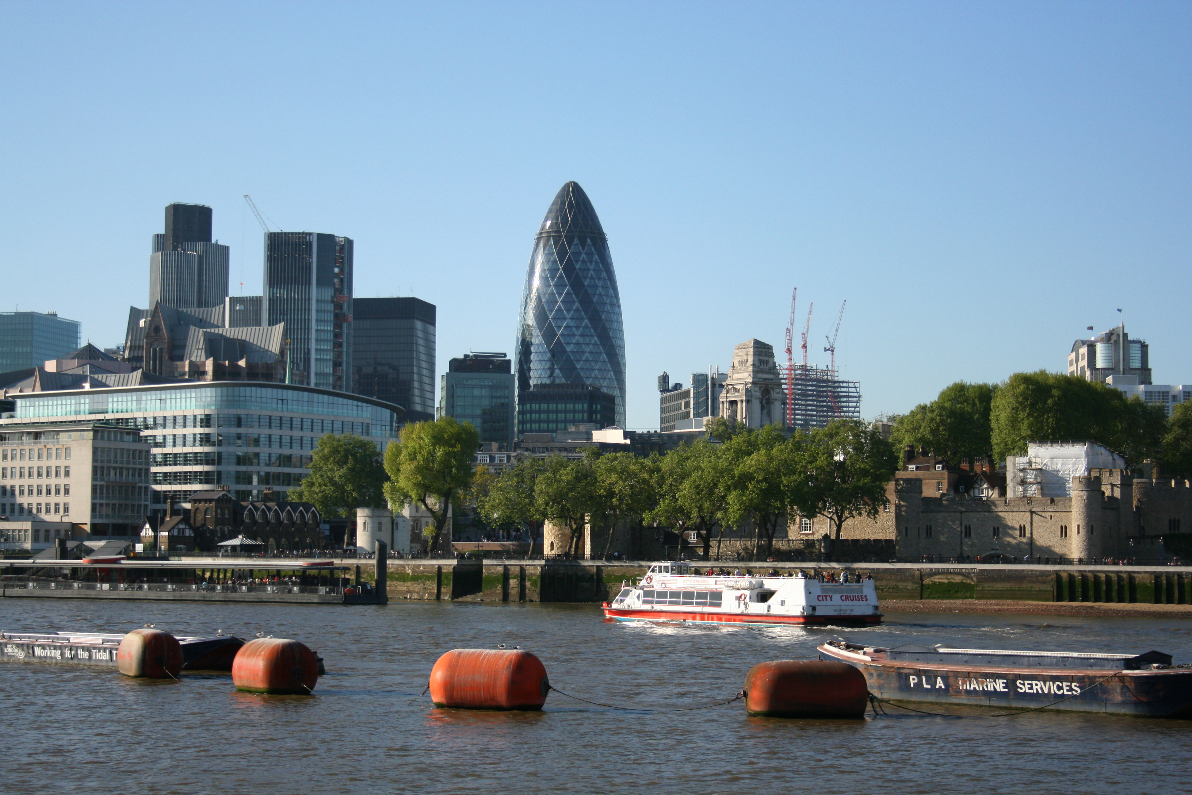 London